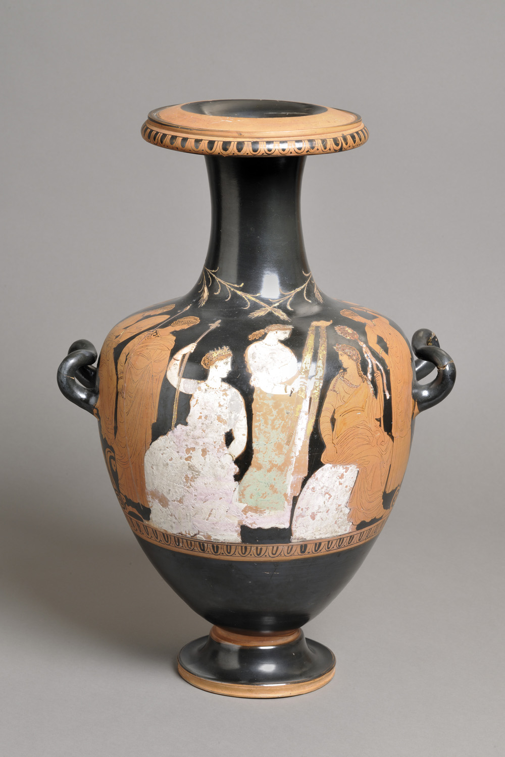 Hydrie - Mystères d'Eleusis, Athènes, Musée des Beaux-Arts, Lyon, France.